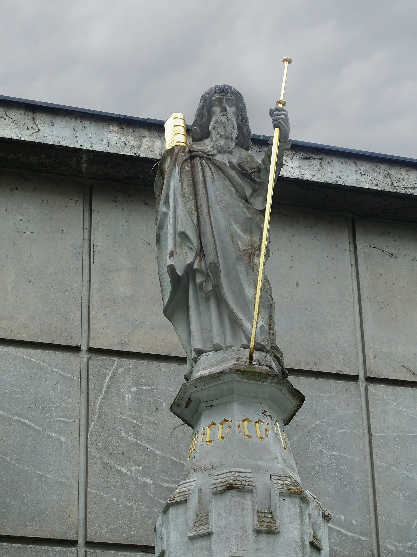 Hans Tussmann (1420–1489) Bildhauer. Jakobsbrunnen mit Statue des heiligen Jakob, Gymnasium Kirschgarten, Basel